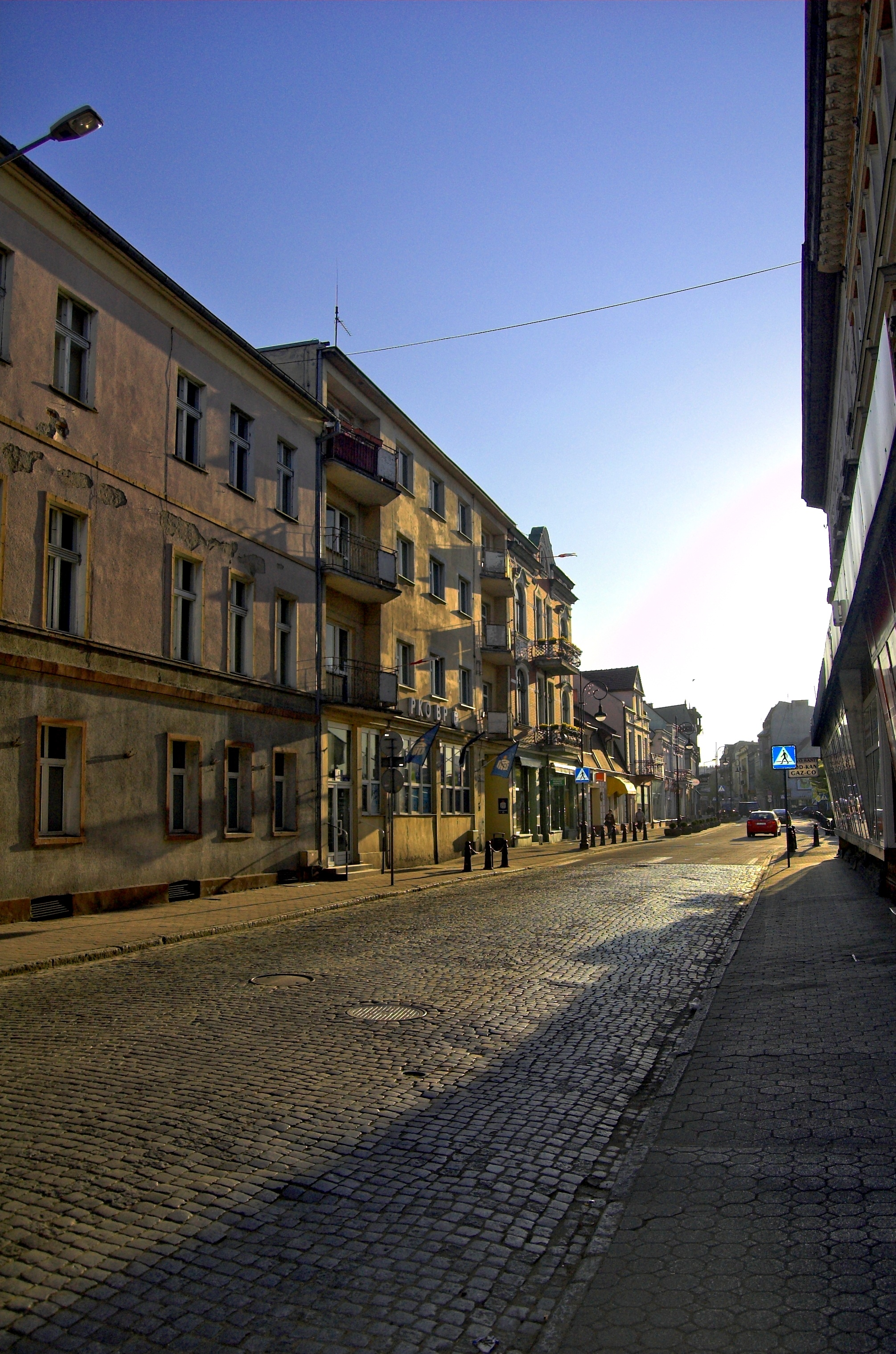 Centrum Nakła nad Notecią